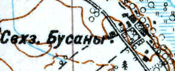 Топографическая карта Ленинградской области, квадрат VIc-28 (Луга), деревня Бусаны